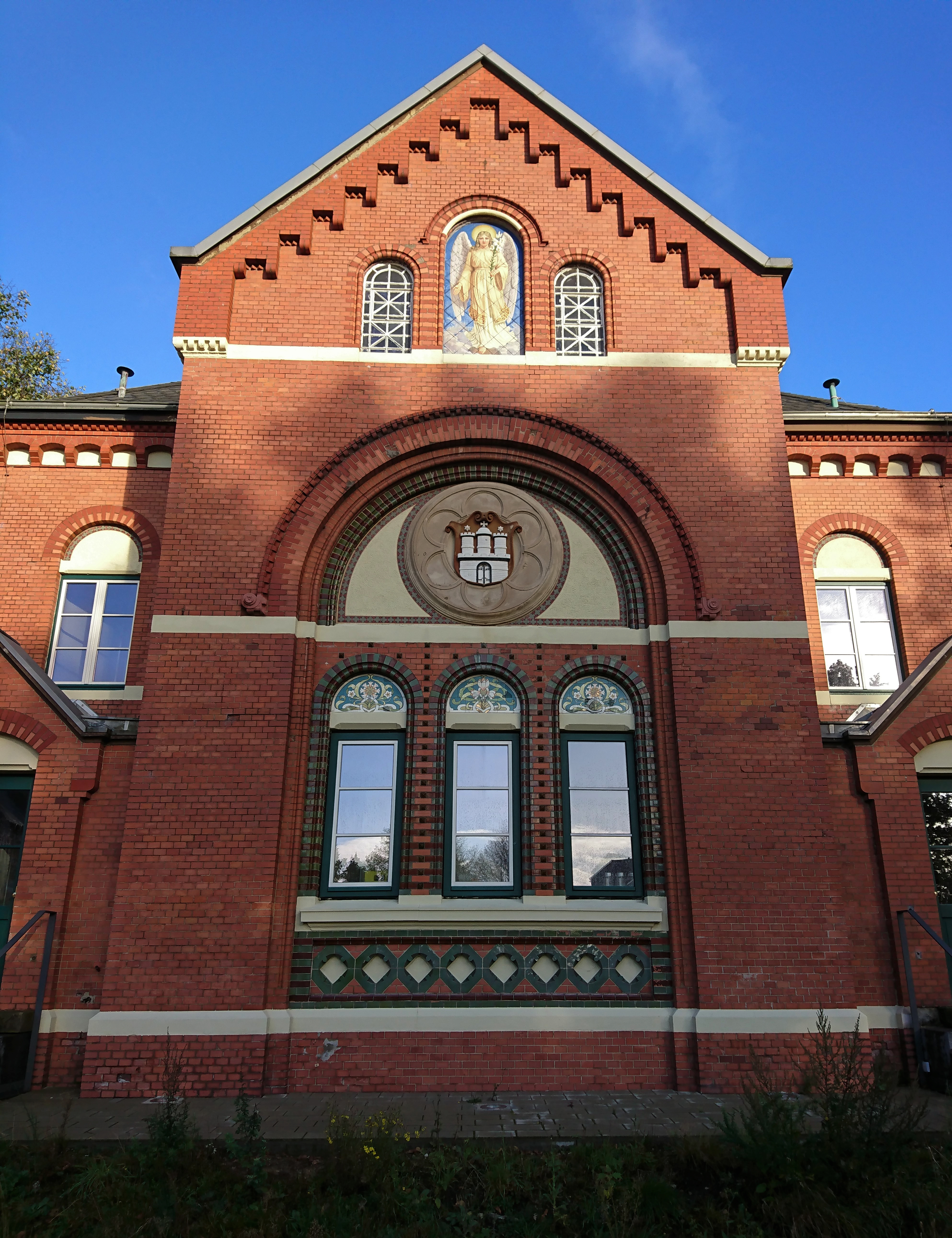 Ehemalige Kapelle, Henny-Schütz-Allee This is a photograph of an architectural monument.